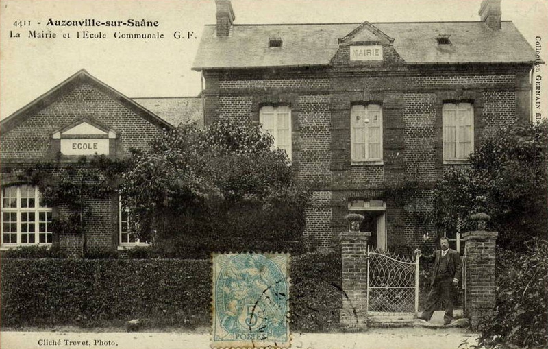 Carte postale